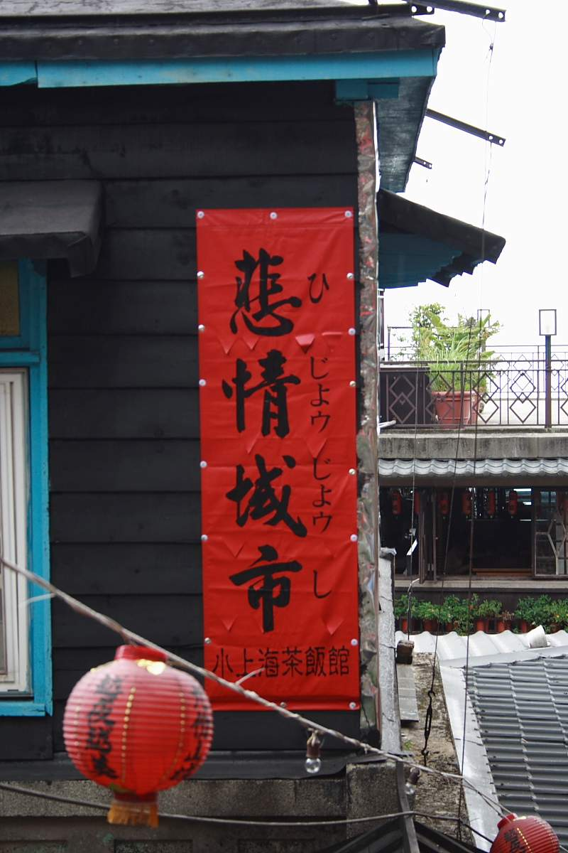 中文（台灣）: 悲情城市 小上海茶飯館